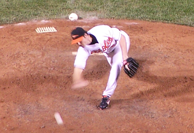 Chad Bradford